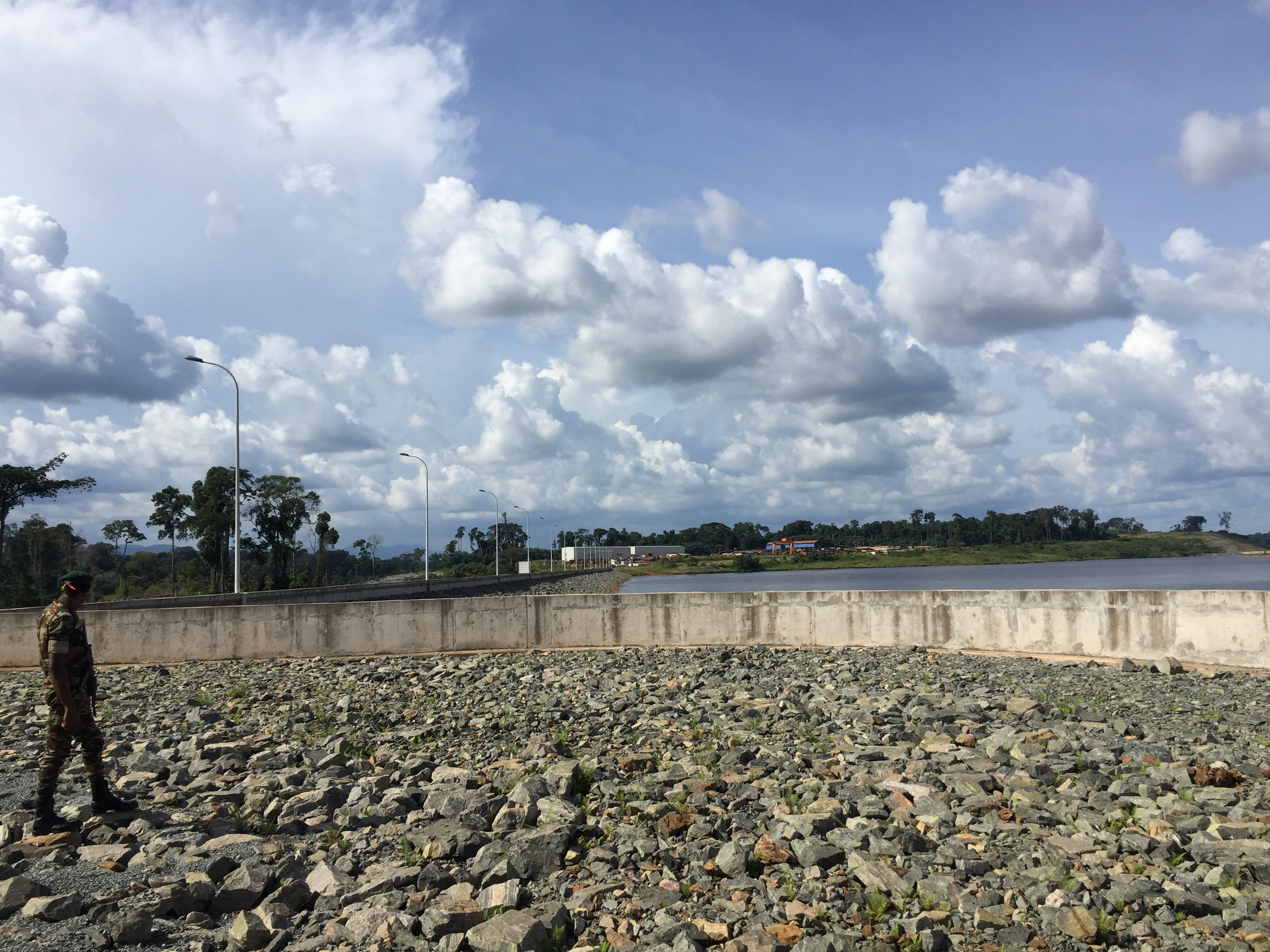 Cette image montre un paysage du barrage hydroélectrique de Memve'ele dans la région du Sud Cameroun